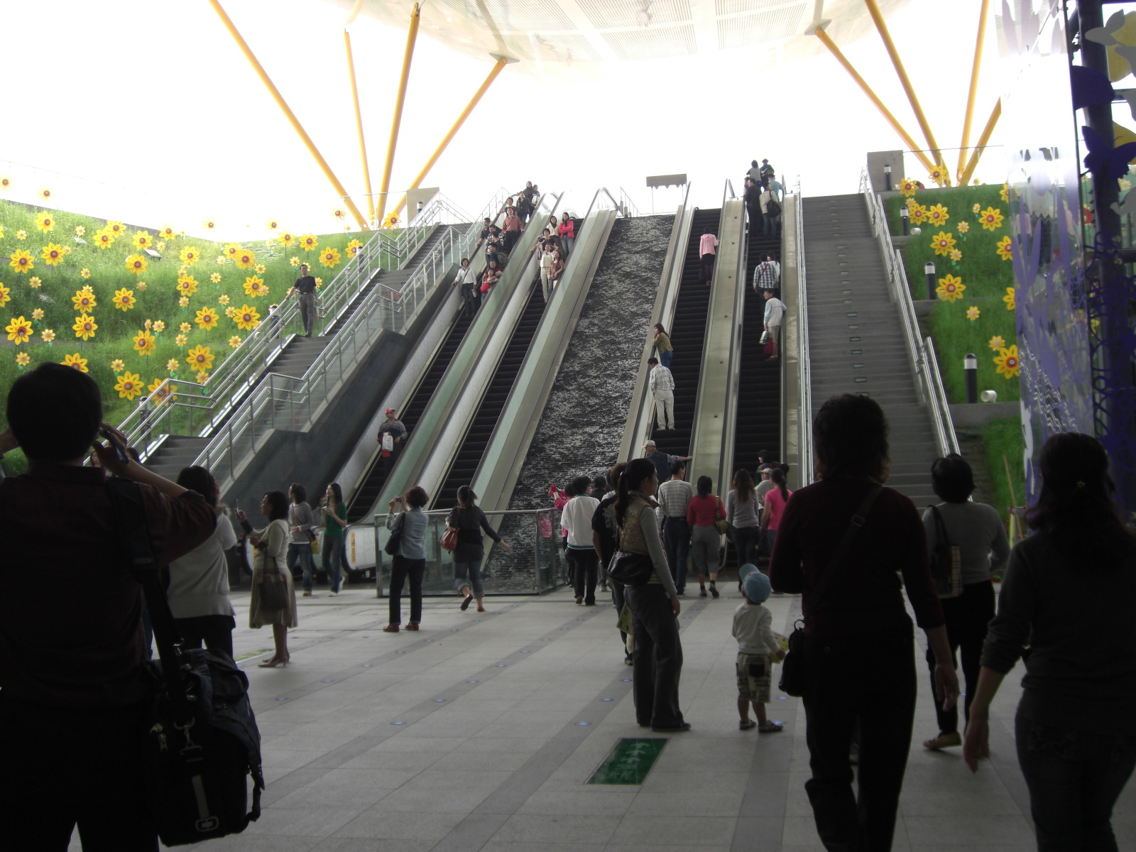 高雄捷運中央公園站出口電扶梯與階梯。